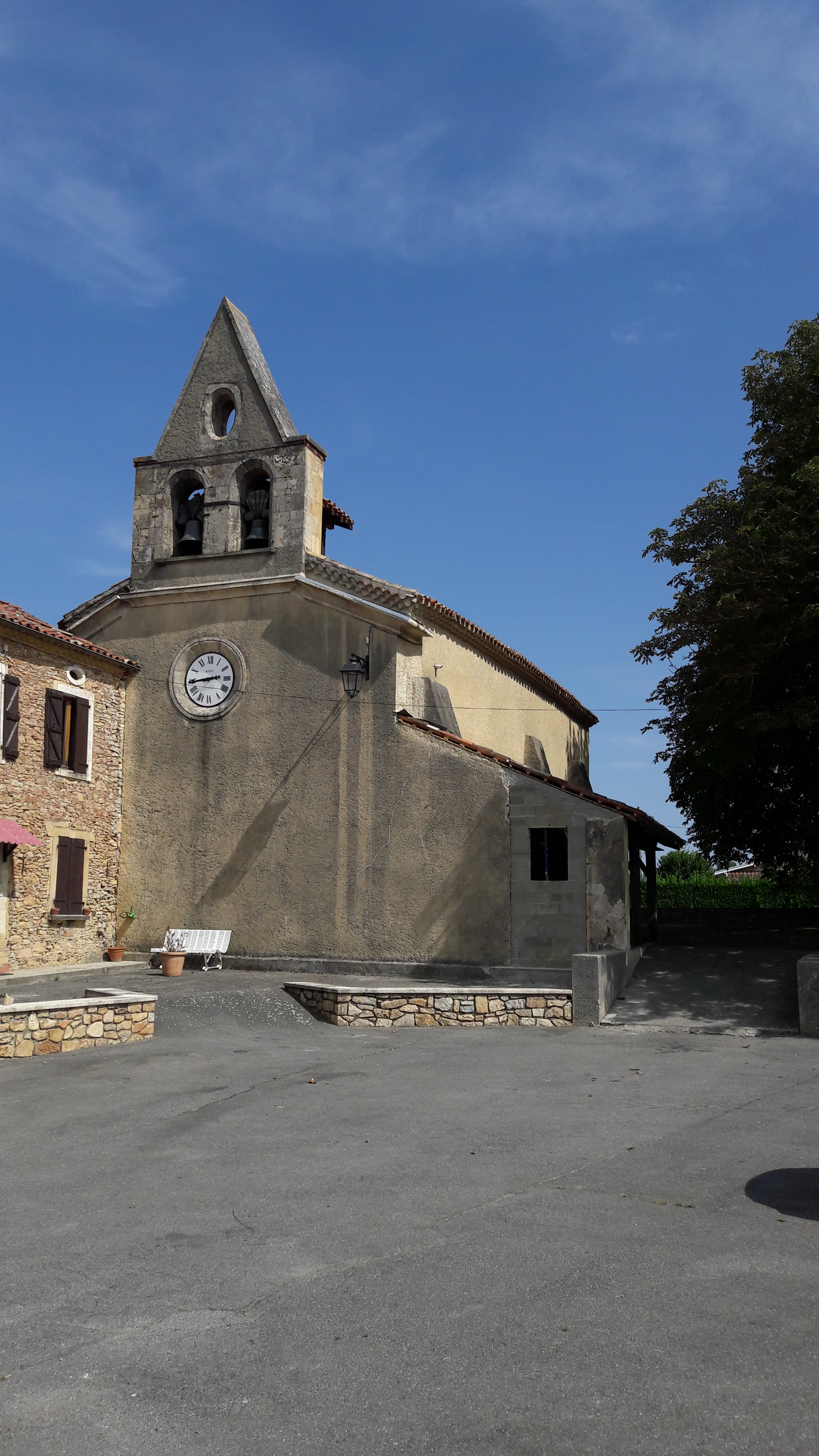 Eglise, presbytère et place de Peyrouzet